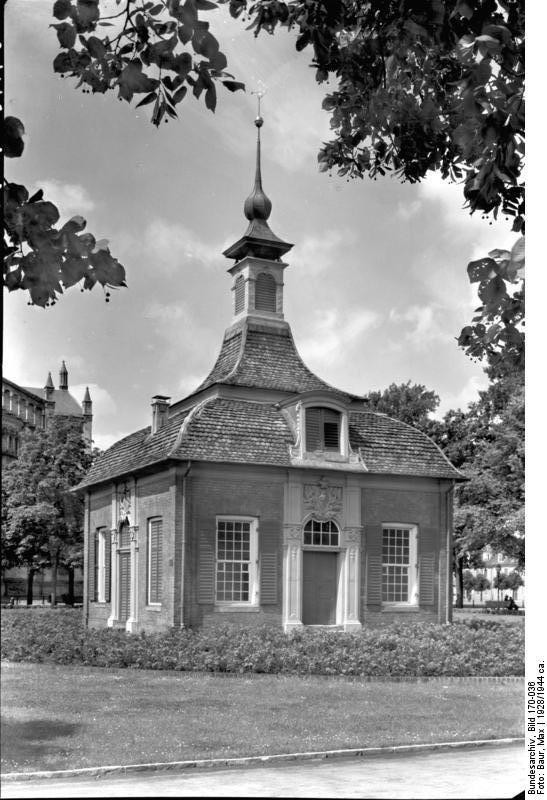 Potsdam.- Glorietta am Bassinplatz (abgebrochen)